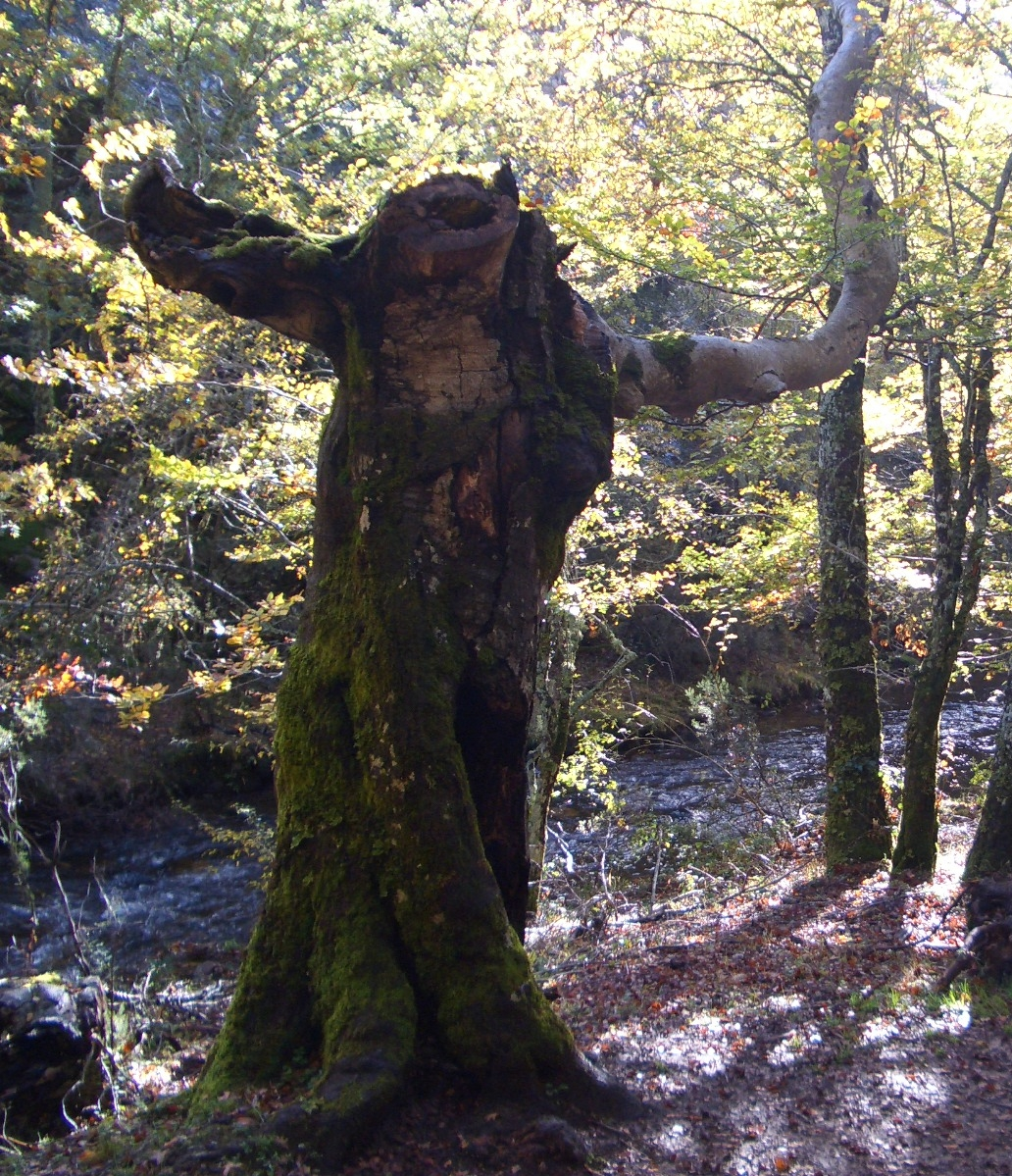 Una de las hayas más antiguas del Hayedo de Montejo, en Madrid (España)